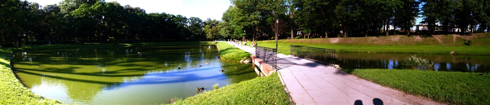 Panorama Parku Helenów w Łodzi